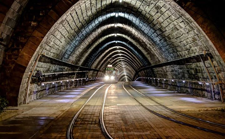 Električka prechádzajúca cez tajomný tunel pod ešte tajomnejším hradom v Bratislave.